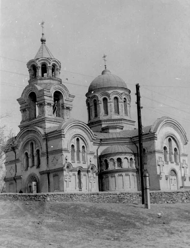 Бізюків монастир: Бізюків монастир